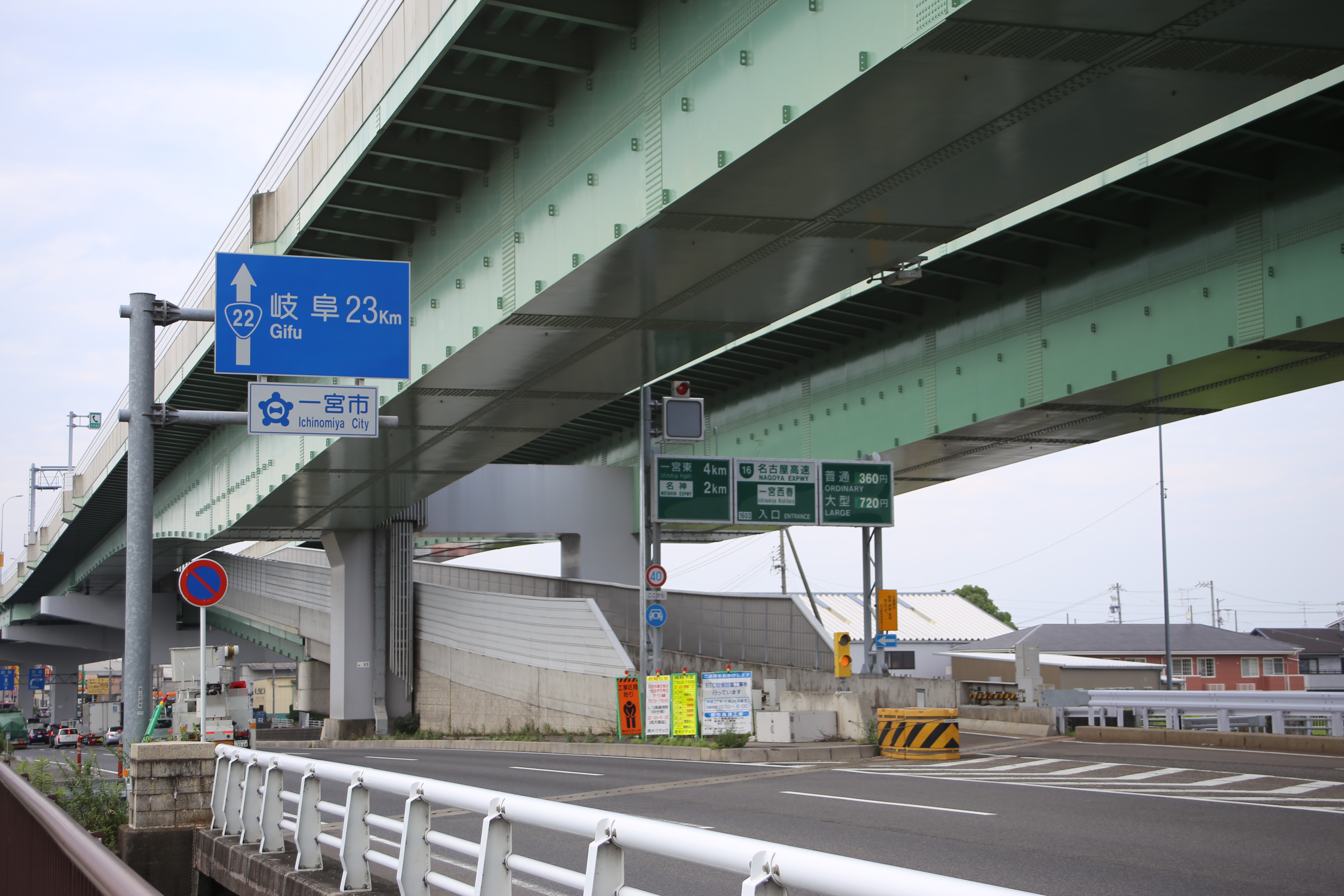 愛知県一宮市の名古屋高速道路16号一宮線の一宮西春入口